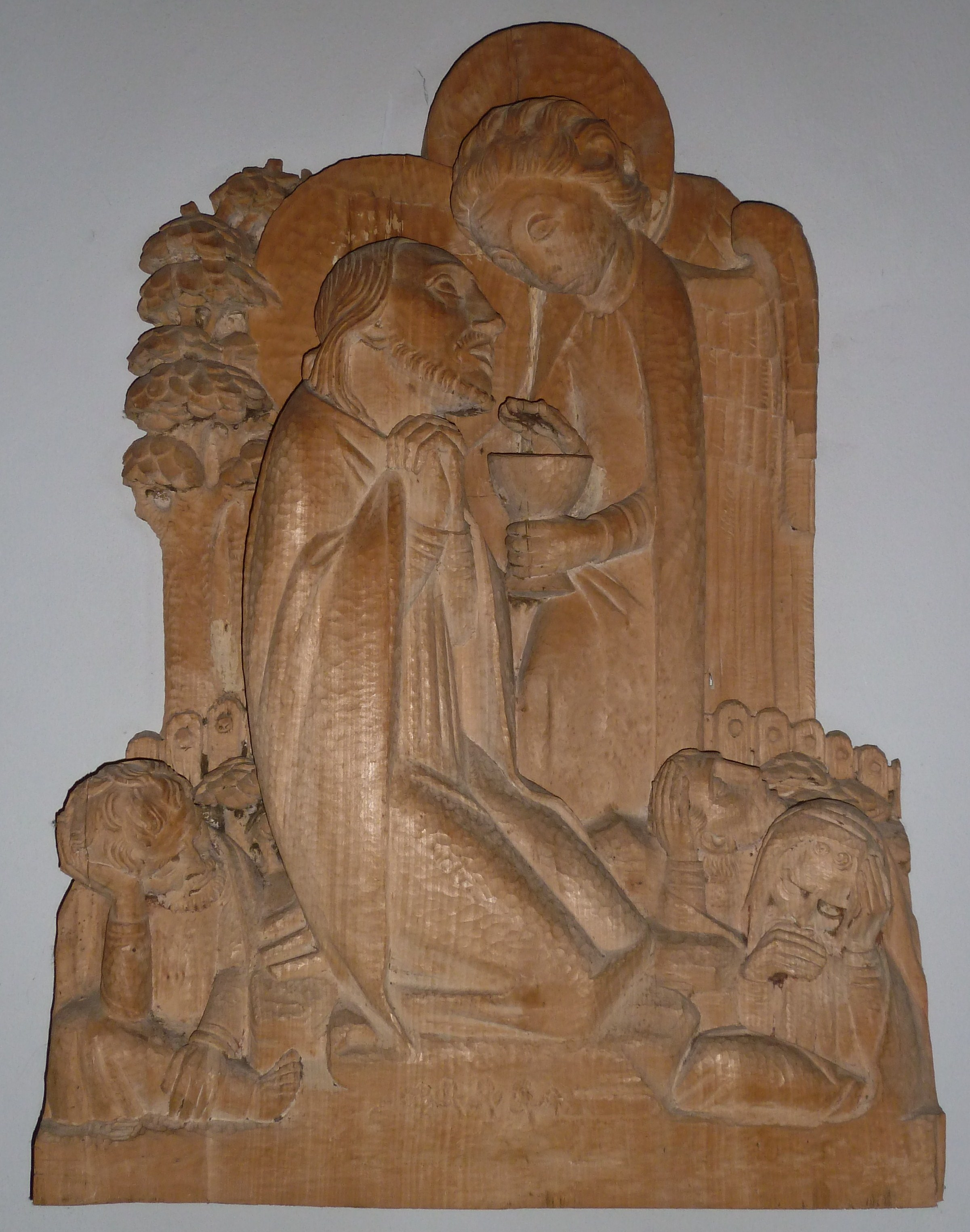 eigene Datei